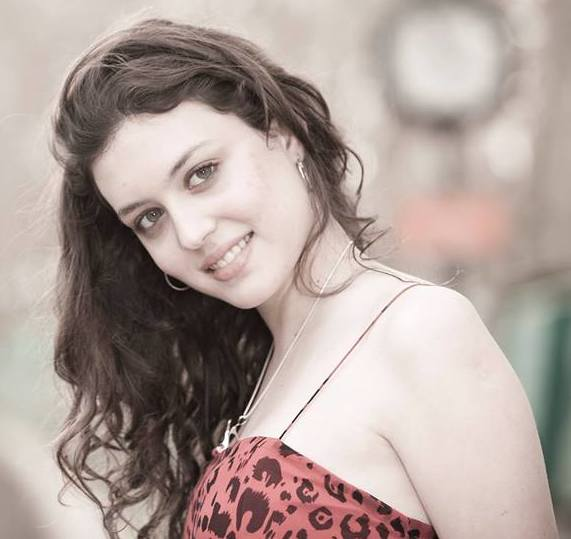 Victoria Bernardi, Nacida en la Ciudad de Buenos aires, en el año 1998, con solo 16 años, se ha vuelto conocida por el Programa la Musica en tus Manos, emitida por Telefe Argentina. Rising Star es un concurso de canto televisión de la realidad internacional basado en el israelí concurso de canto HaKokhav Haba (que significa "The Next Star") hecha por Keshet Radiodifusión Ltd . El formato del programa permite a los espectadores votan por los concursantes a través de aplicaciones móviles .